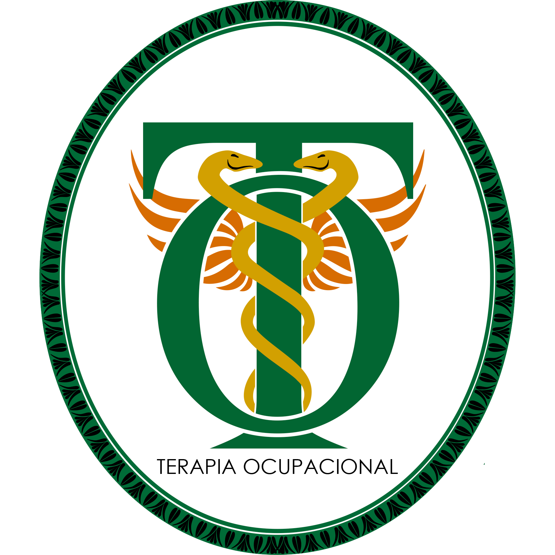 O bastão de Esculápio, que representa o poder da cura, ganha uma releitura com o formato da letra T de terapia, significando o processo de intervenção na ressignificação do cotidiano em busca da independência, autonomia, funcionalidade, participação e empoderamento social, este, por sua vez, representado pelas asas da Fênix, as quais remetem à simbologia do poder de transformação e renascimento para a vida ocupacional do sujeito. As cobras trazem a astúcia, criatividade e capacidade de resiliência dos terapeutas ocupacionais por meio da prescrição, adaptação, treino e aplicação de atividades significativas que compõem as ocupações, representadas, aqui, pela letra O, que remete ao sujeito ocupacional.